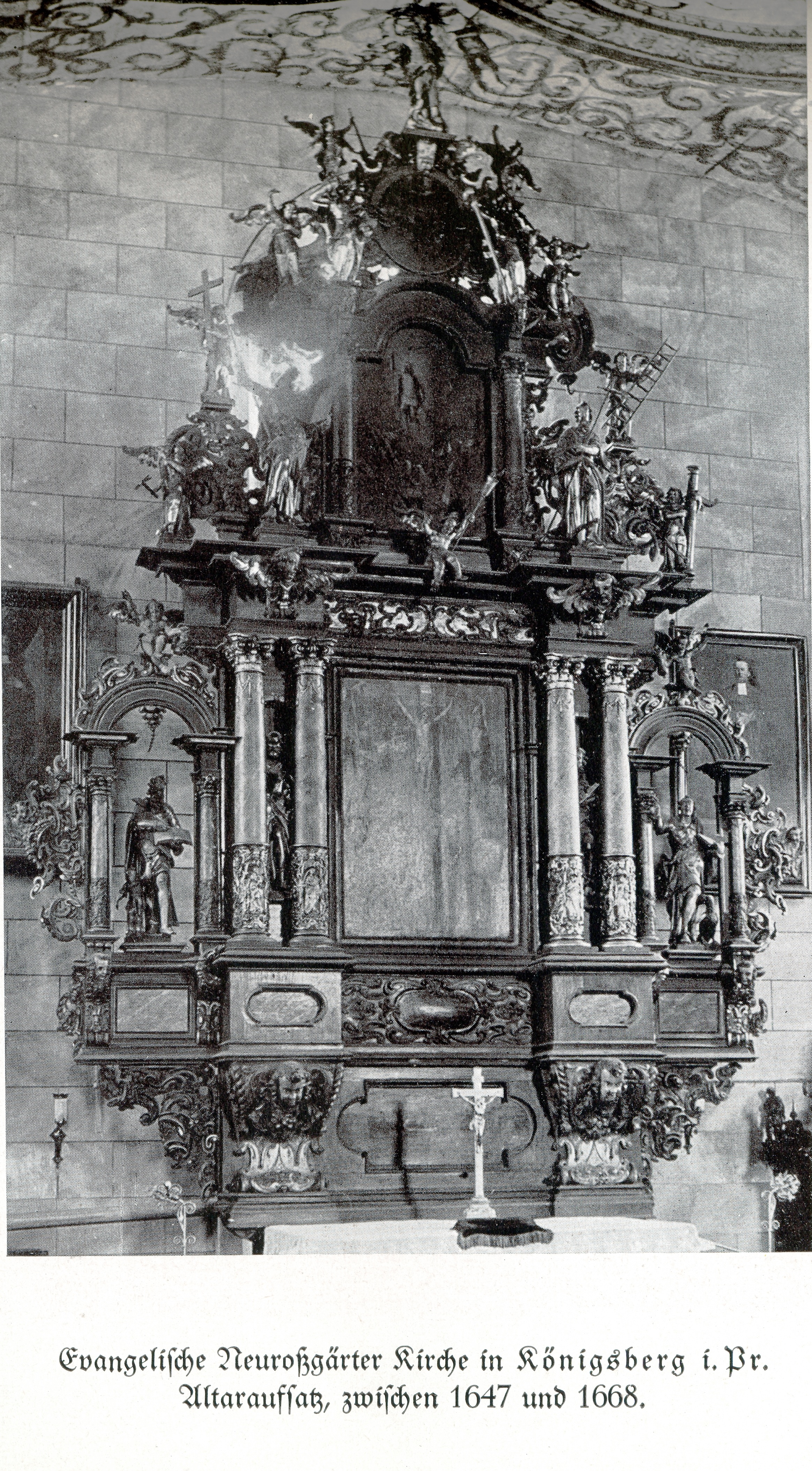 Königsberg, Neuroßgärter Kirche, Altaraufsatz, zwischen 1647 und 1668